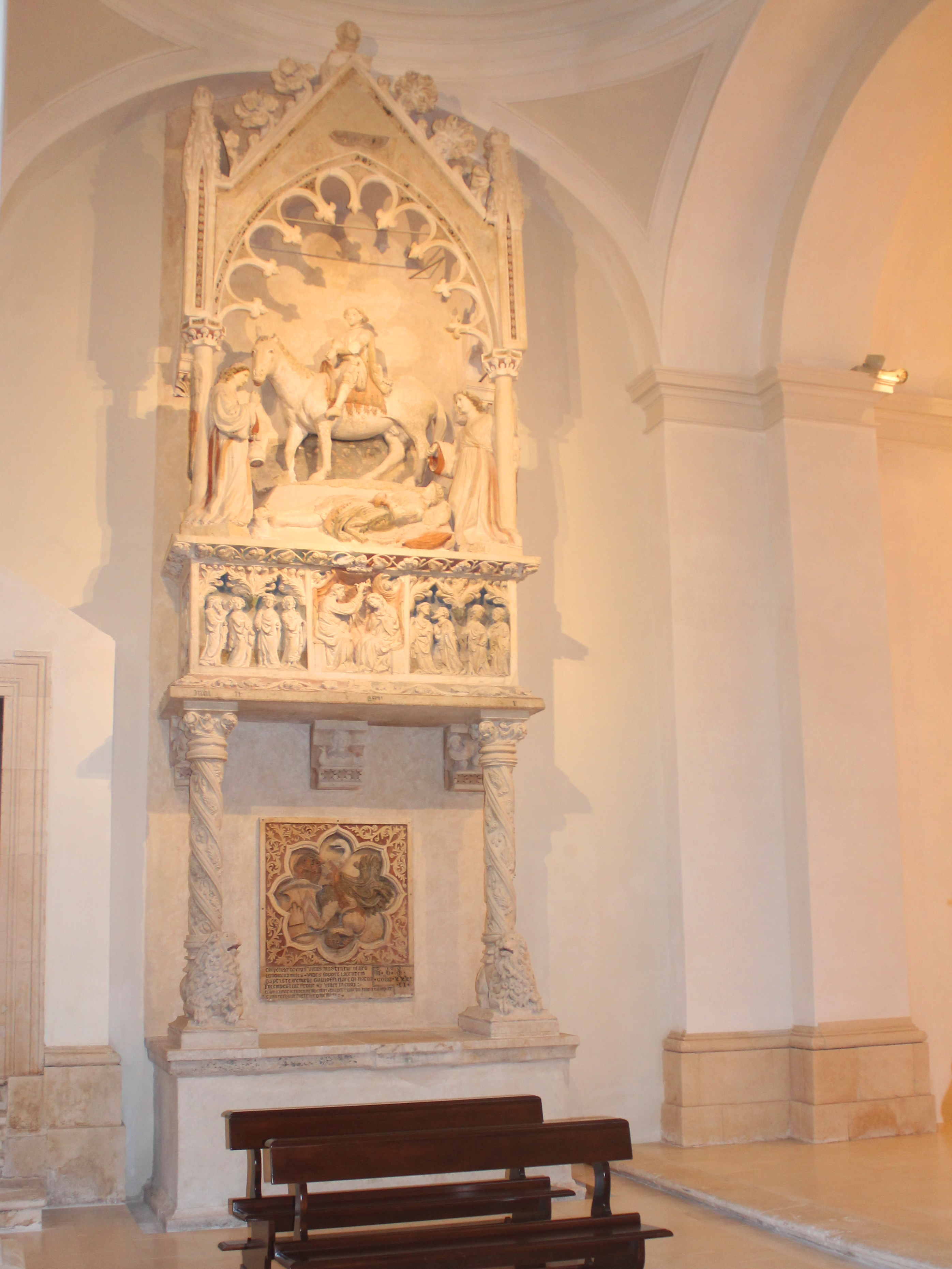 Interno della chiesa di San Biagio in L'Aquila: monumento a Pietro Lalle Camponeschi